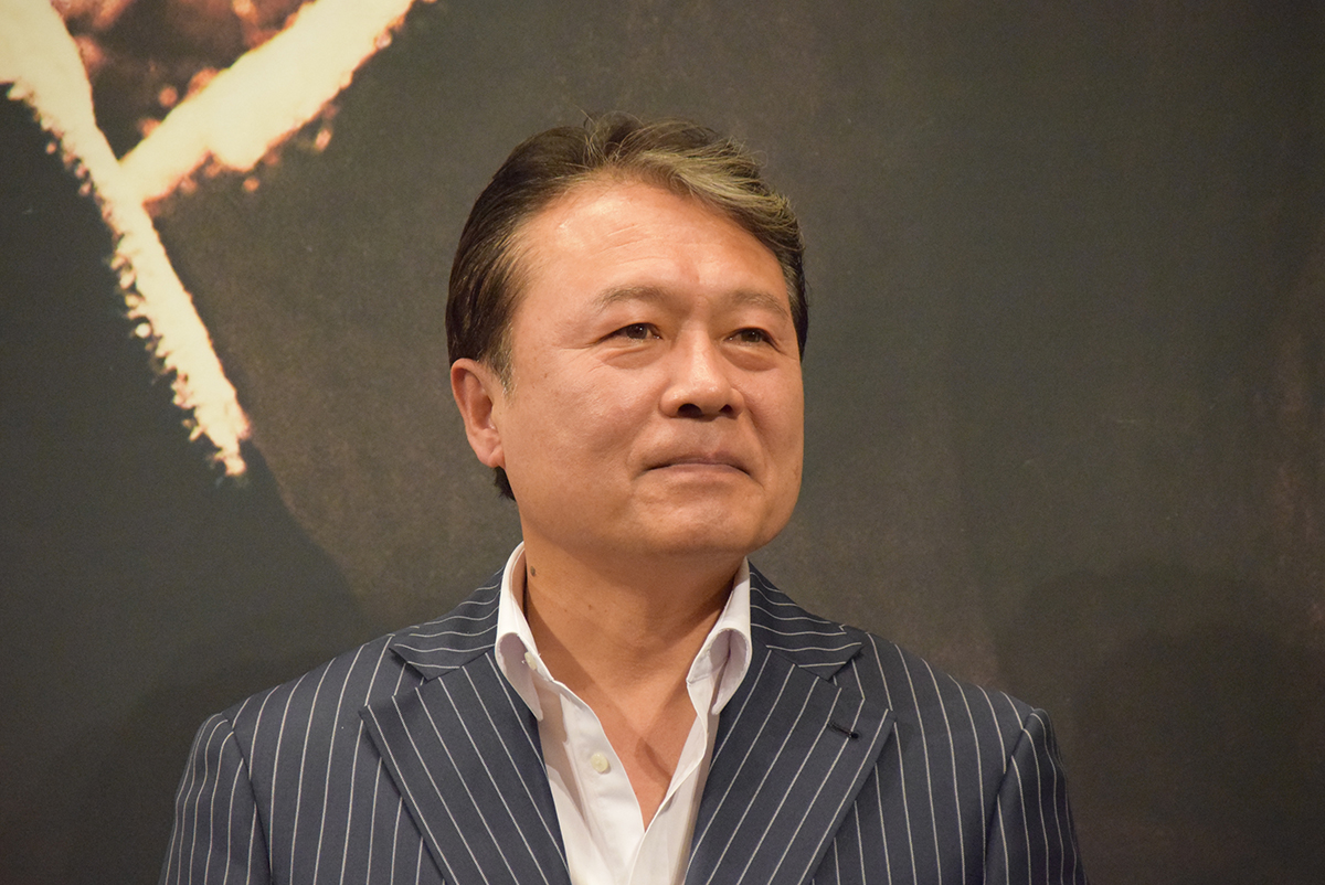 천호진 OCN오리지널 '구해줘2' 제작발표회 (2019.4.30)